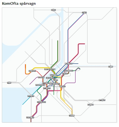 Spårvagnssträckningarna i Göteborg efter diverse utbygningar